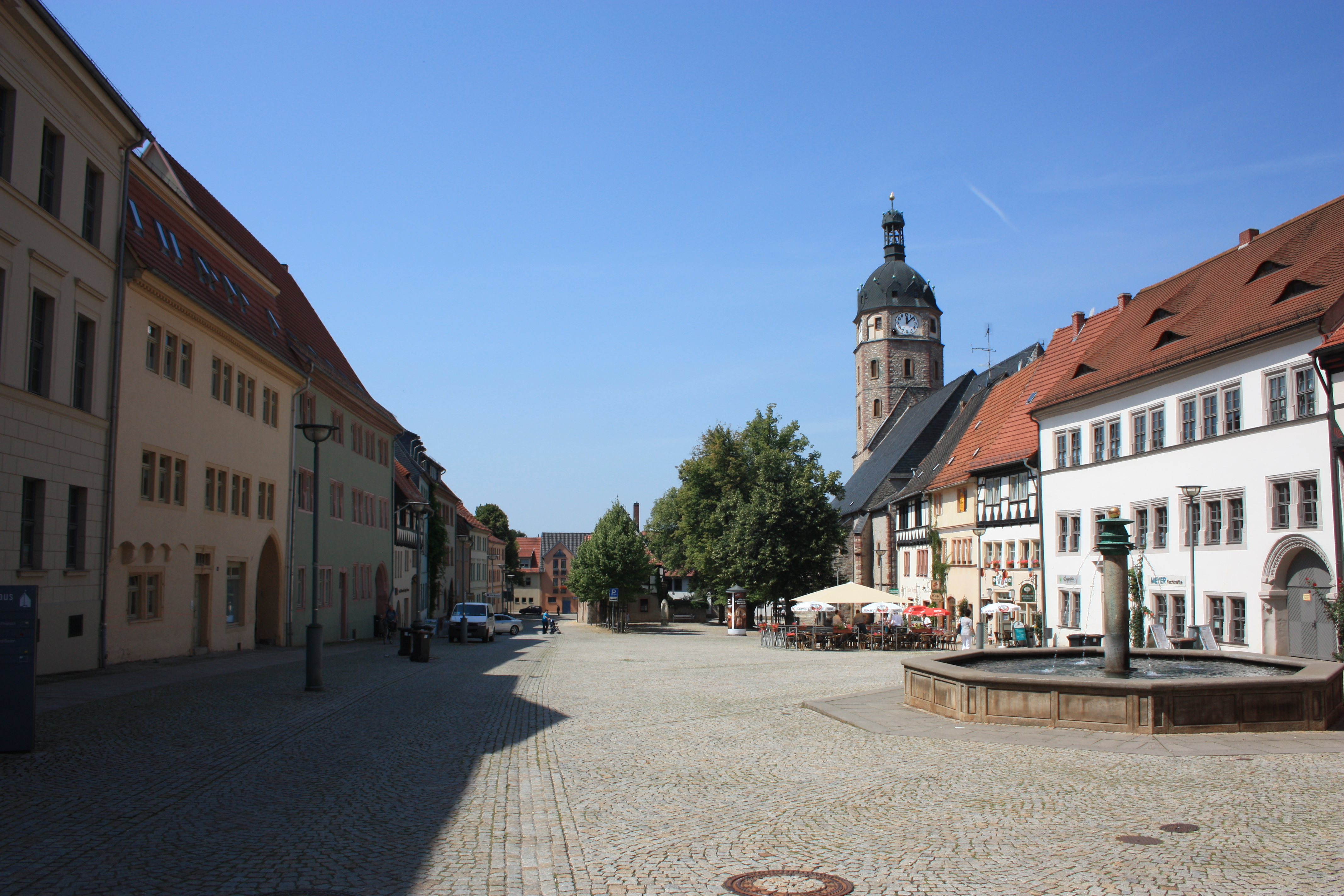 der Marktplatz in Sangerhausen, Blick Richtung Osten